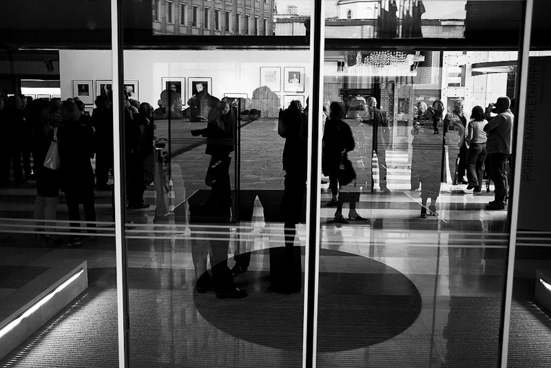 mapplethorpe exhibition @ tr3, ljubljana, 2009 (Výstava fotografií Roberta Mapplethorpa v Ljubljani (2009))